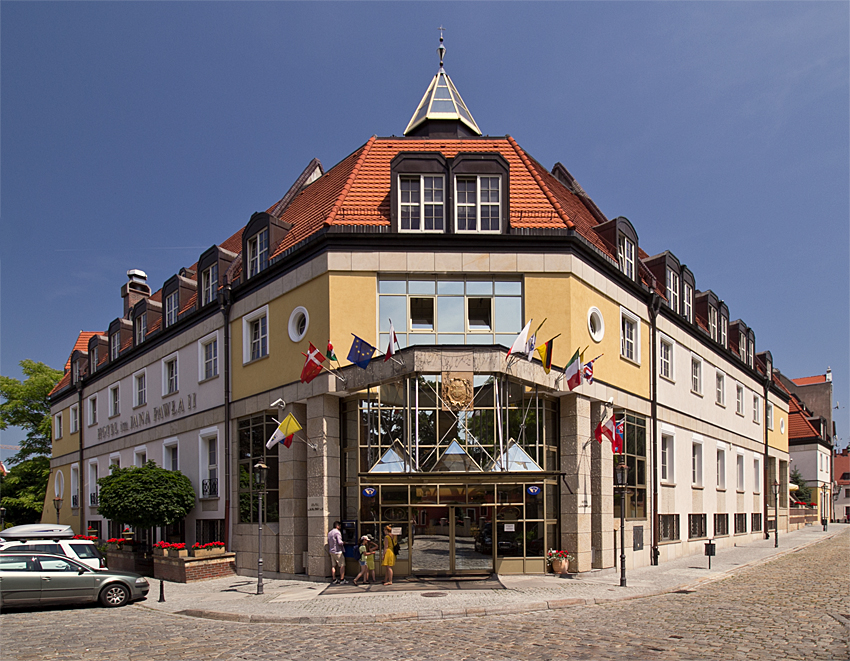 Hotel Jana Pawła II we Wrocławiu